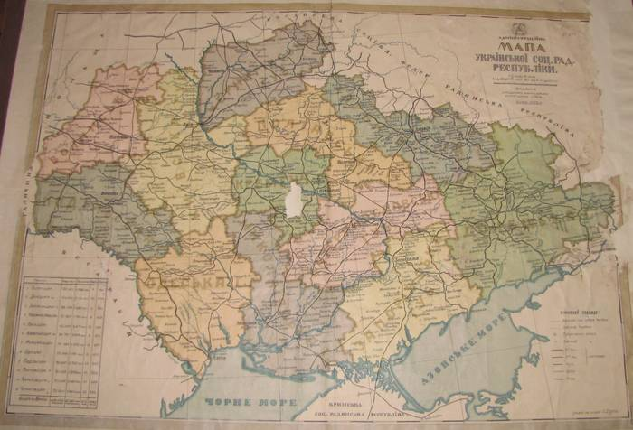 Карта Української РСР, 1922